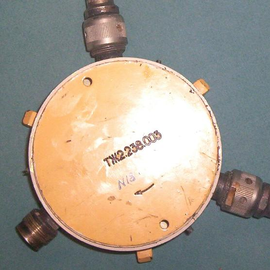 passiver HF-Zirkulator mit koaxialen Ports